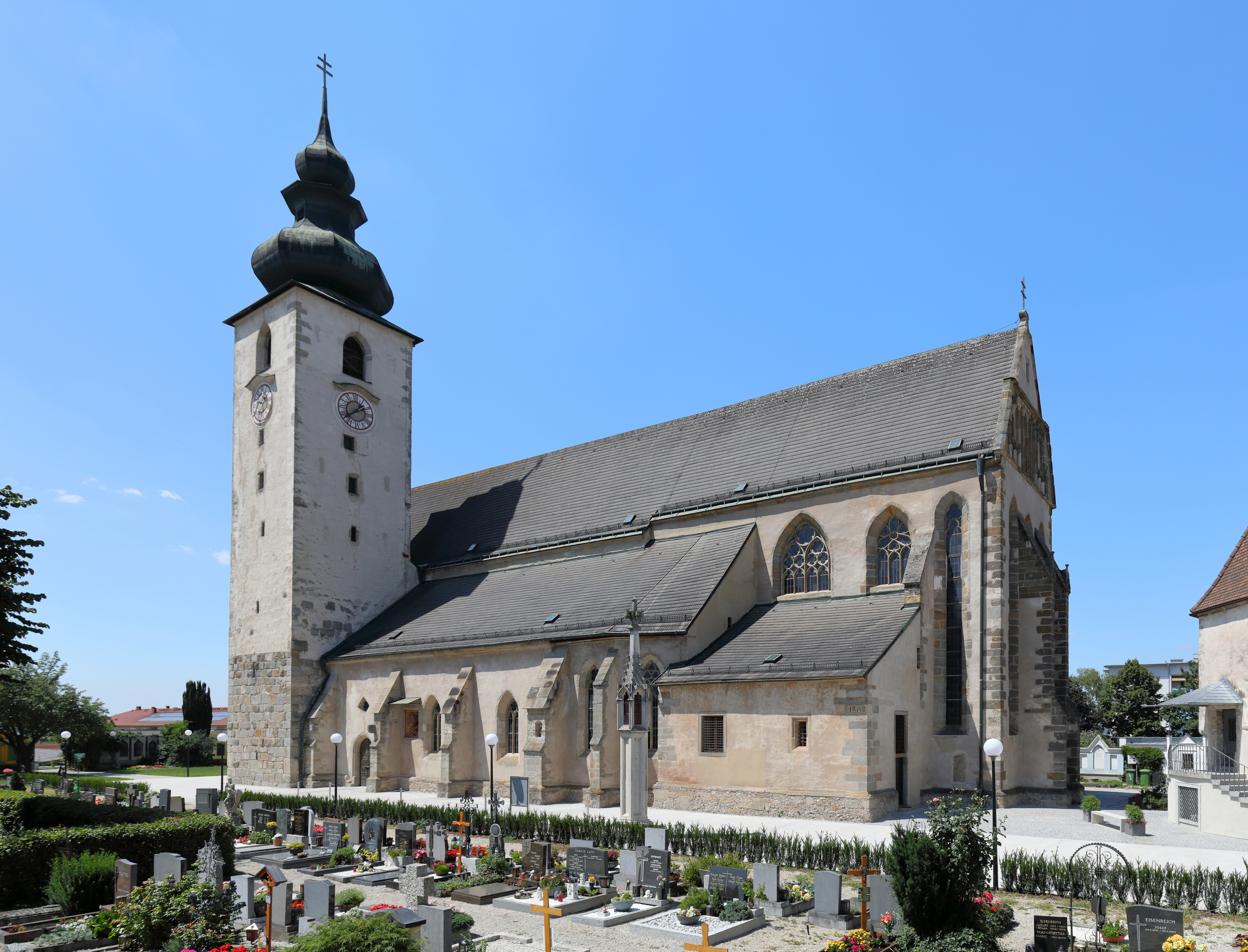 Ostansicht der röm.-kath. Pfarrkirche und Basilika St. Laurenz in der oberösterreichischen Stadt Enns. Ursprünglich eine romanische Pfeilerbasilika, welche seit 1323 in gotische Um- und Erweiterungsbauten aufging.